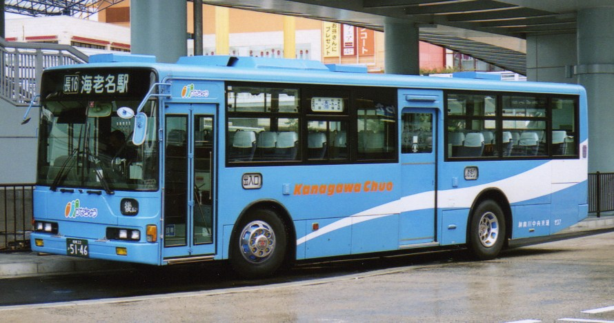 Kanachu Se27（せ27） mitsubishi KC-MP717M at Ebina Sta.